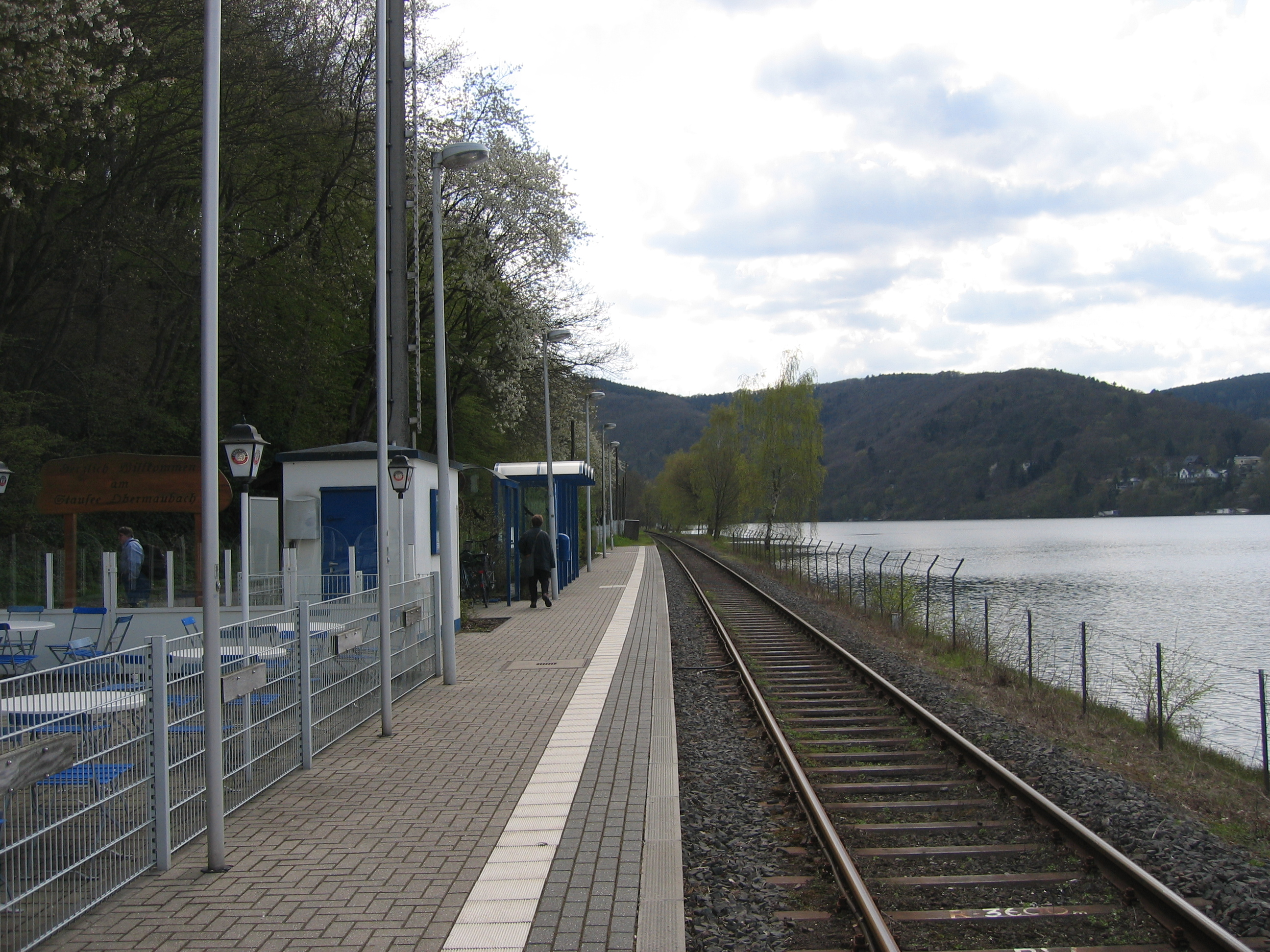 Haltepunkt Obermaubach an der Bahnstrecke Düren–Heimbach.